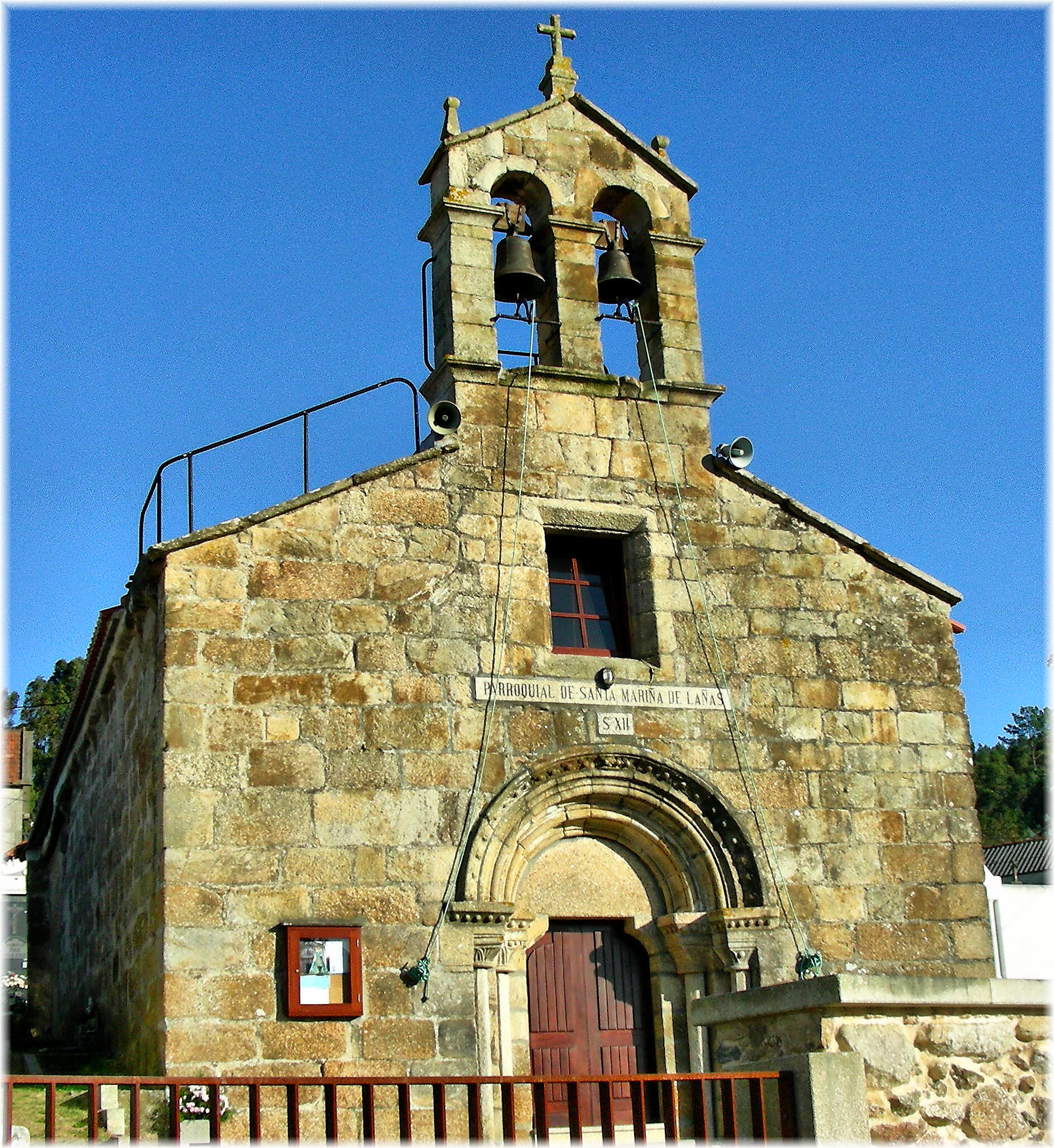 Igrexa de Santa Mariña de Lañas, Arteixo